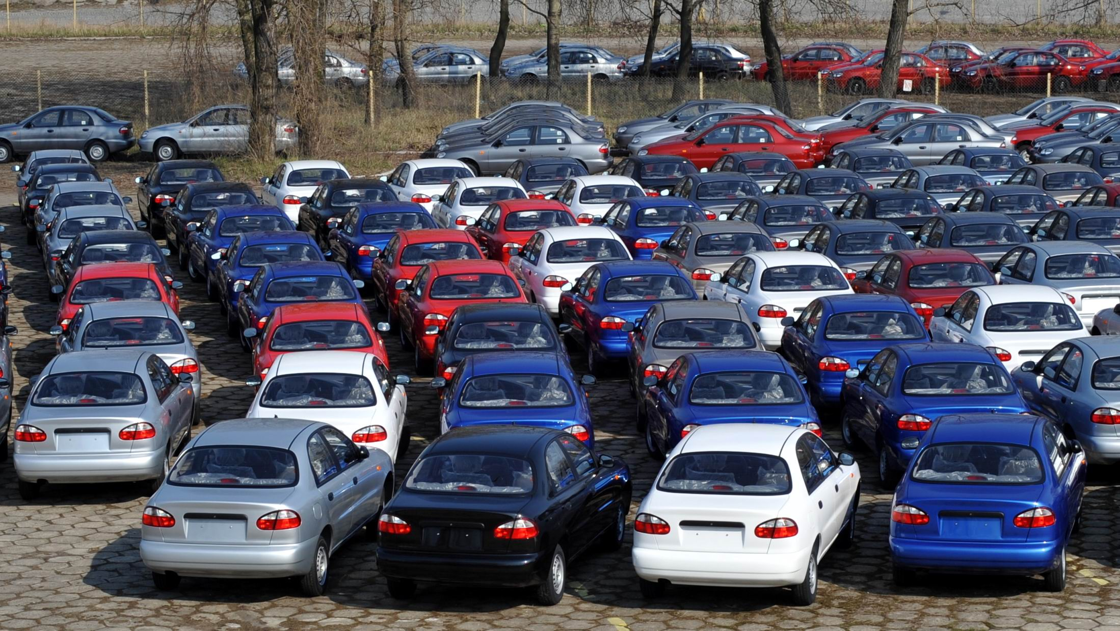 Nowe samochody FSO na przyzakładowym parkingu.